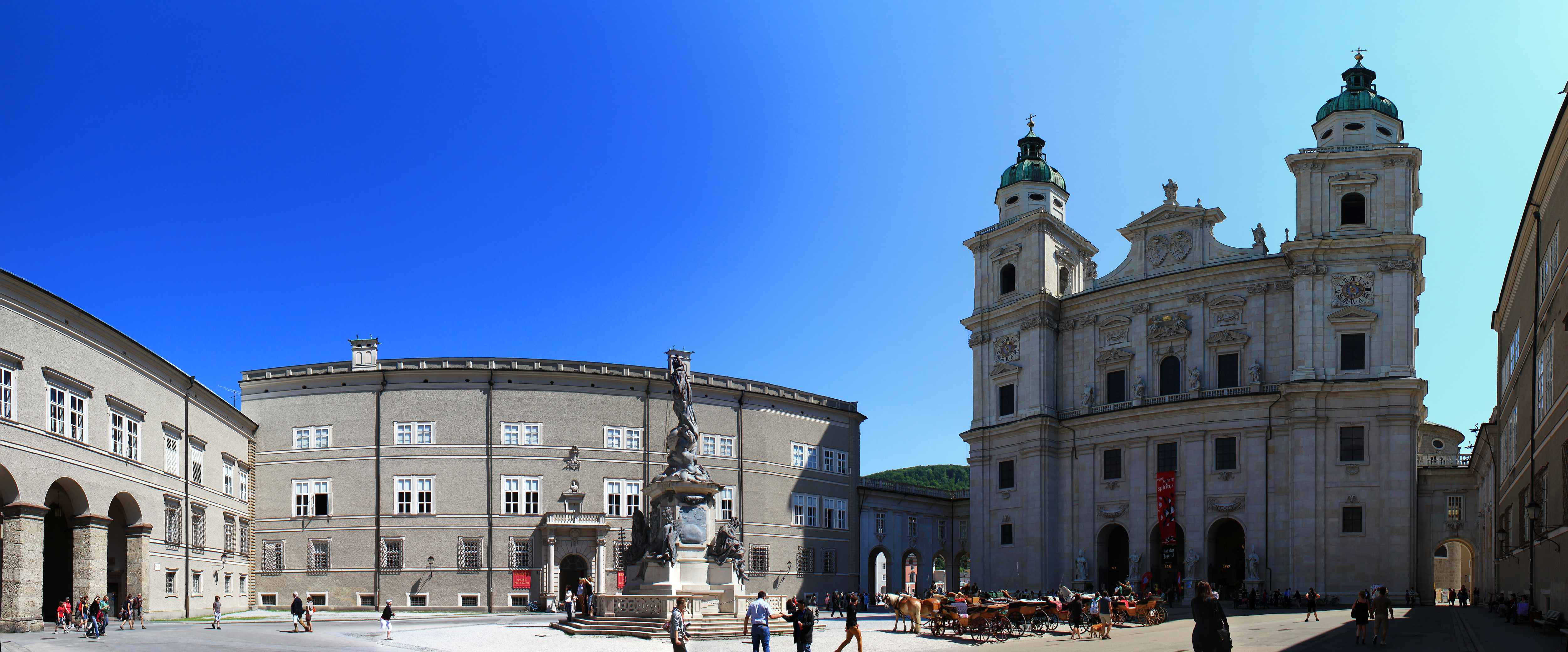 Panoramafoto Domplatz Salzburg